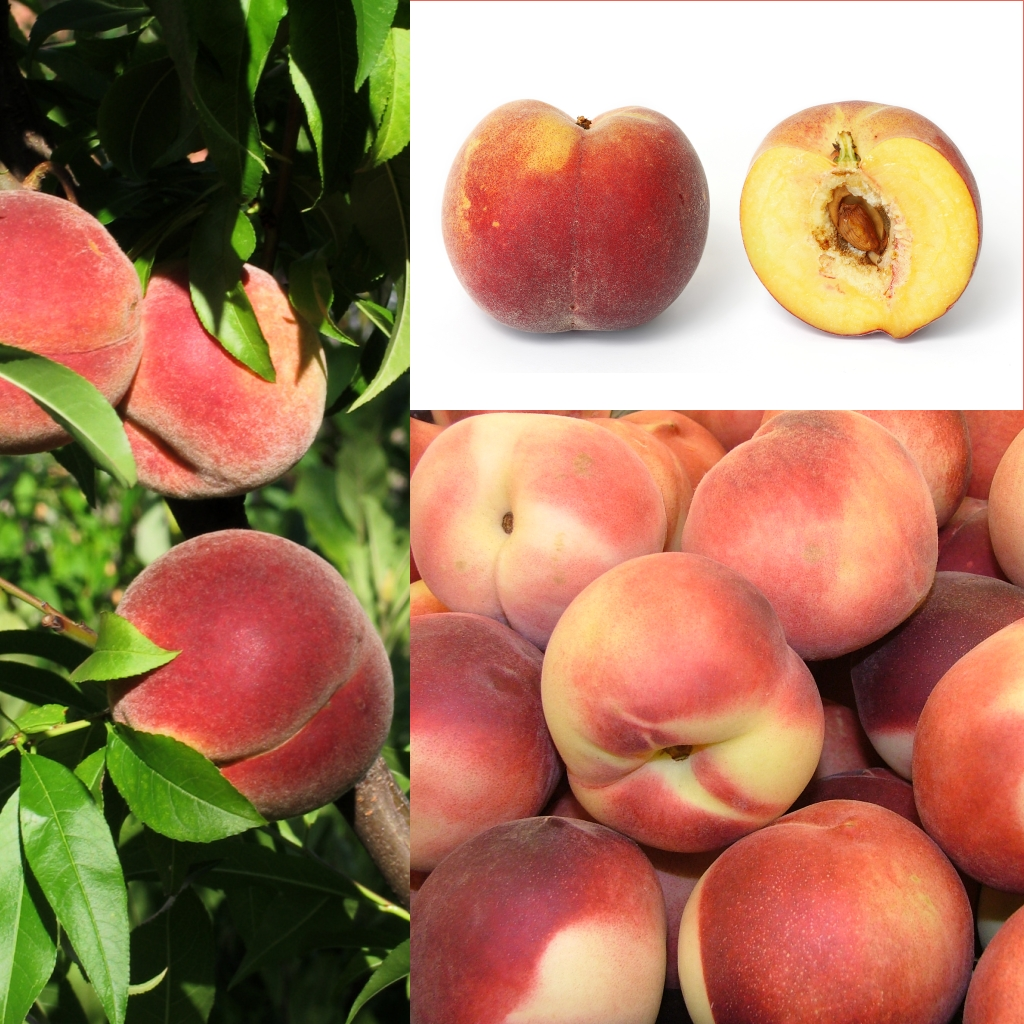 Grafika podręcznika Wikijunior:Owoce. Brzoskwinia (Prunus persica).